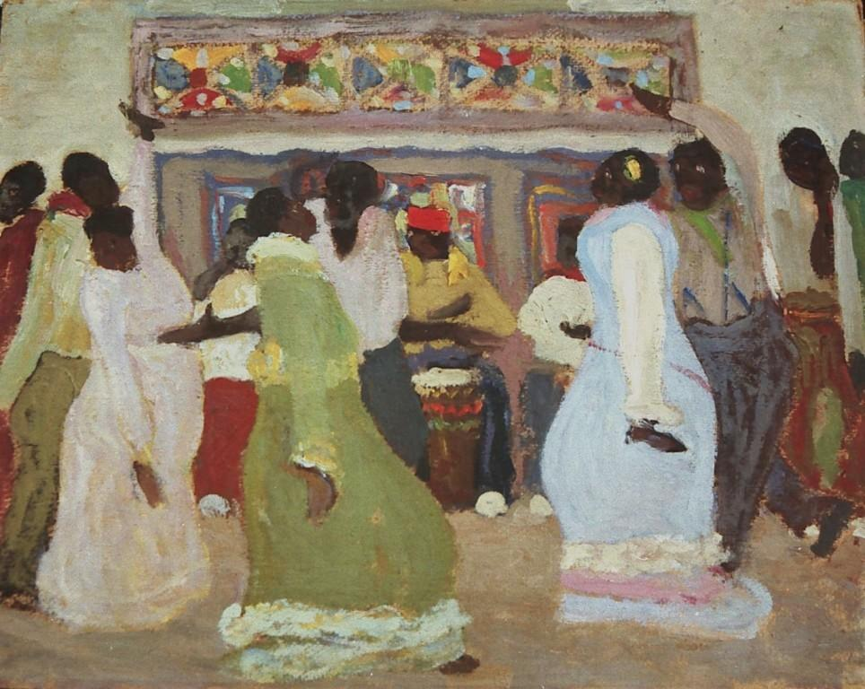 Pedro Figari - Candombe (óleo s/cartón) - 40x50cm